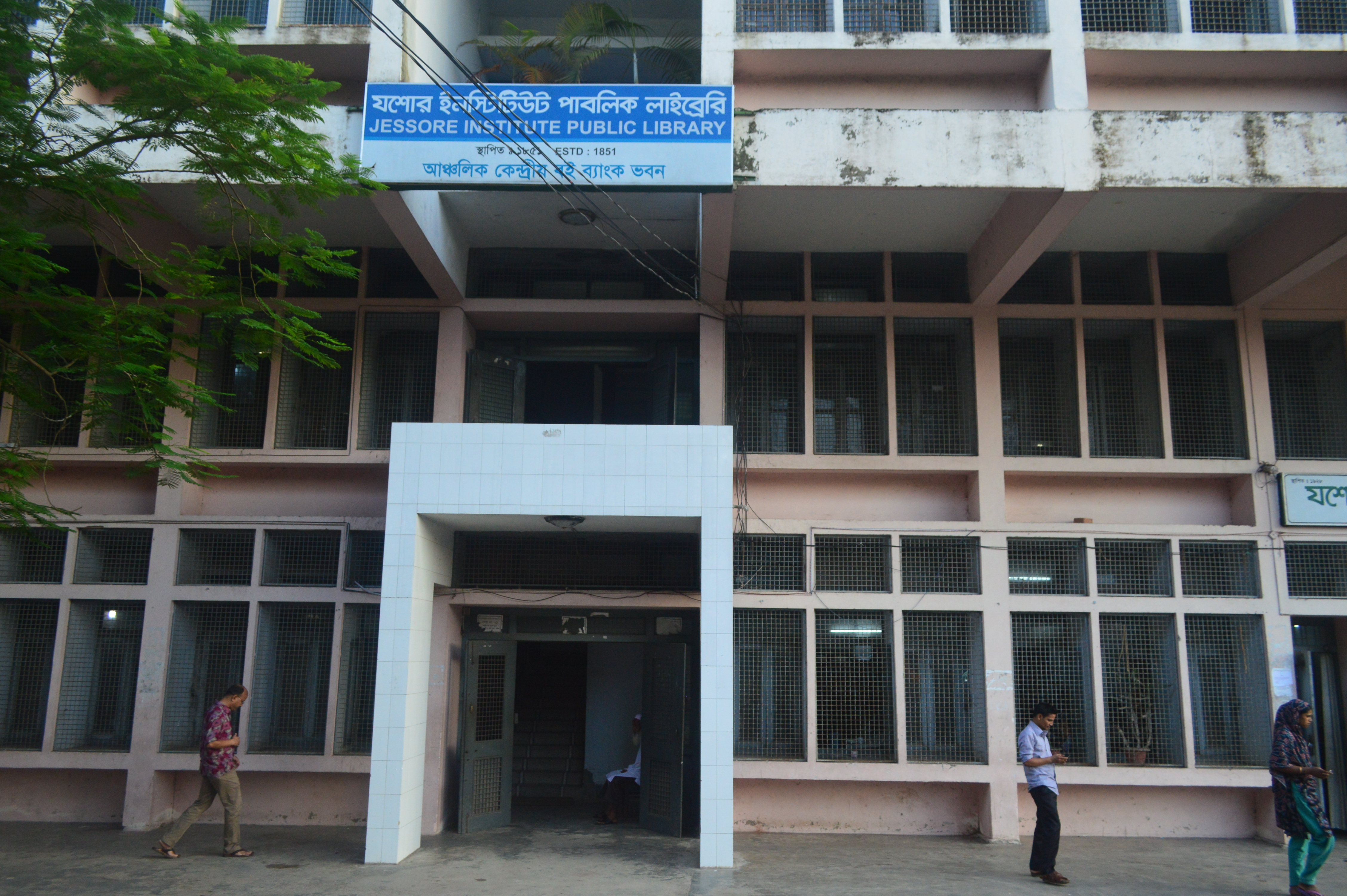 বাংলাদেশের ১ম পাবলিক লাইব্রেরী